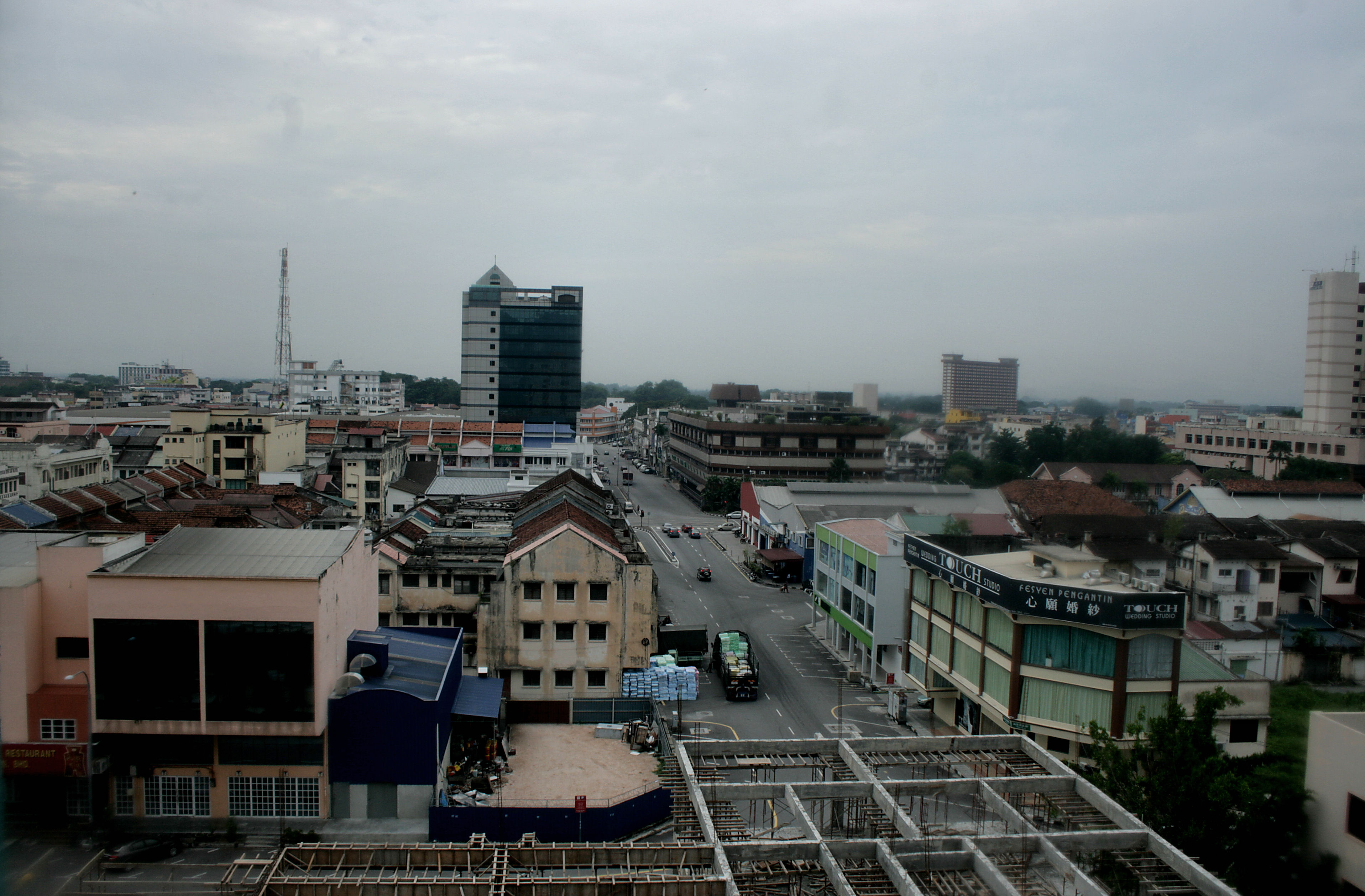 Ipoh